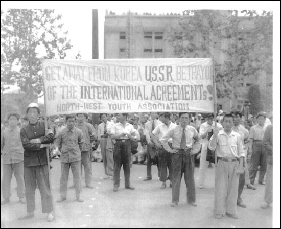 1948. 5. 31. 국회 개원식 날 국회 의사당 앞에서 서북청년단들이 소련 철수를 주장하는 데모를 하고 있다